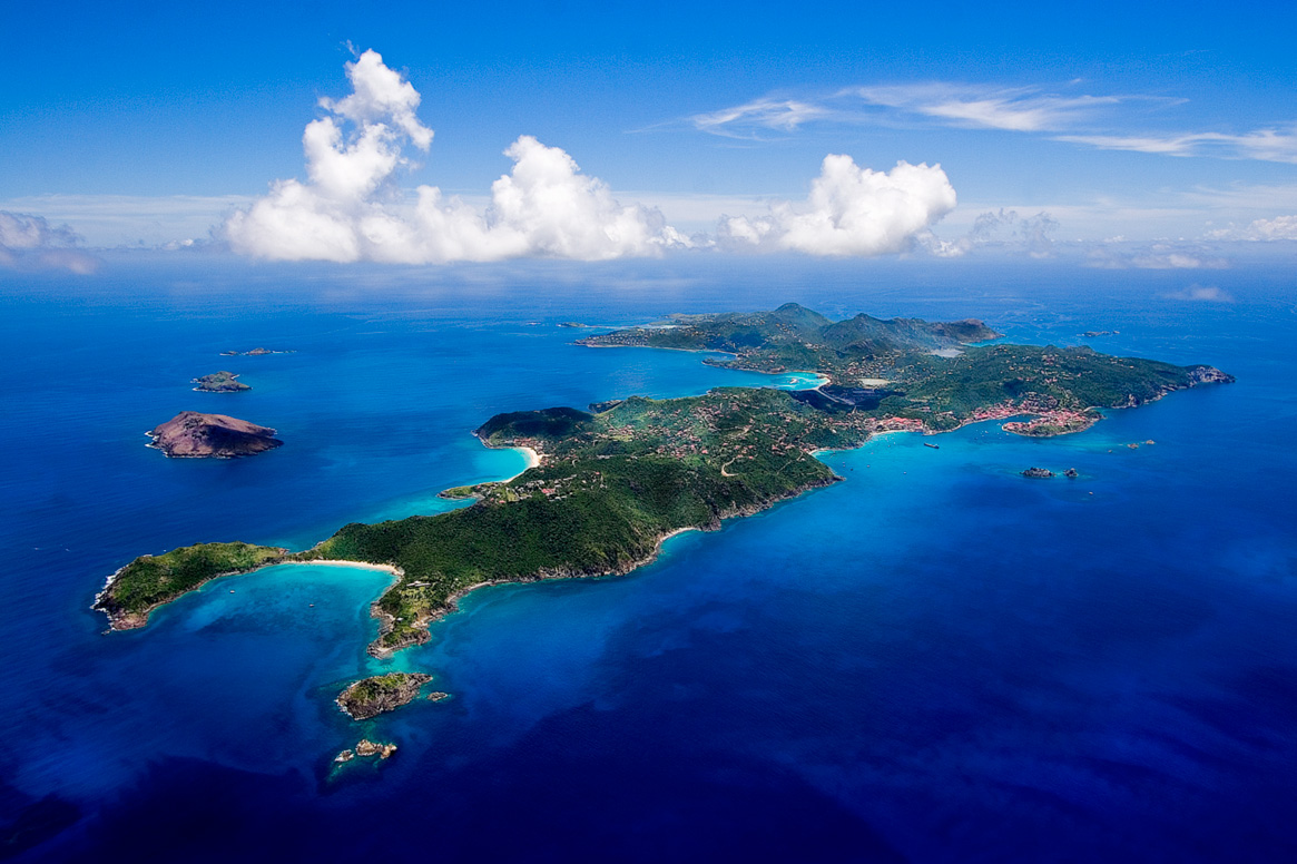 St-Barth vue de Haut